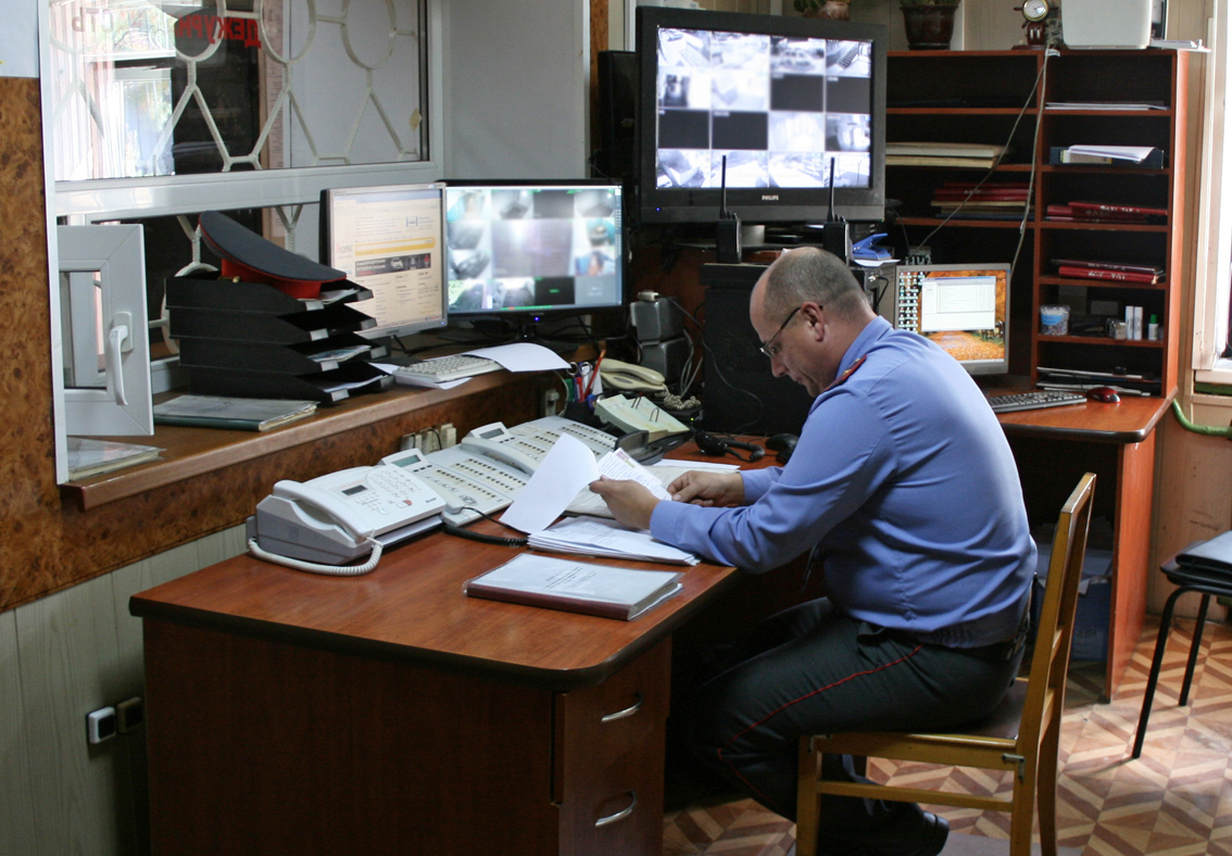 Дежурная часть территориального органа МВД России на районном уровне